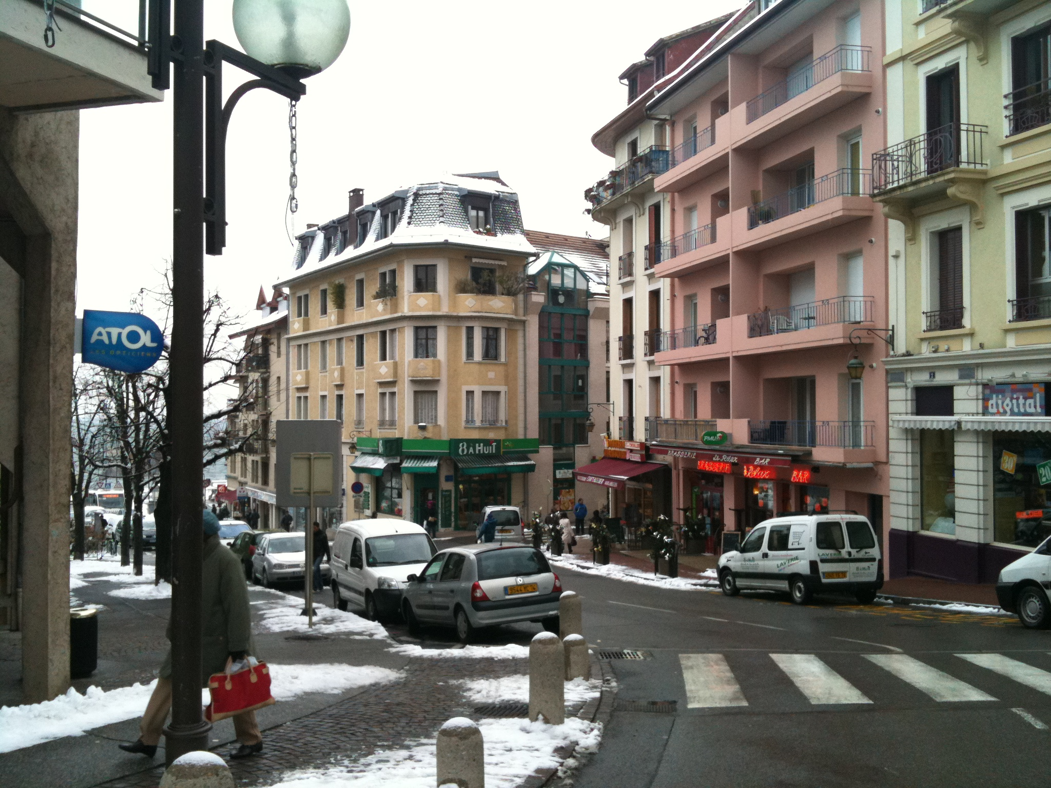 Évian-les-bains, Haute-Savoie, France